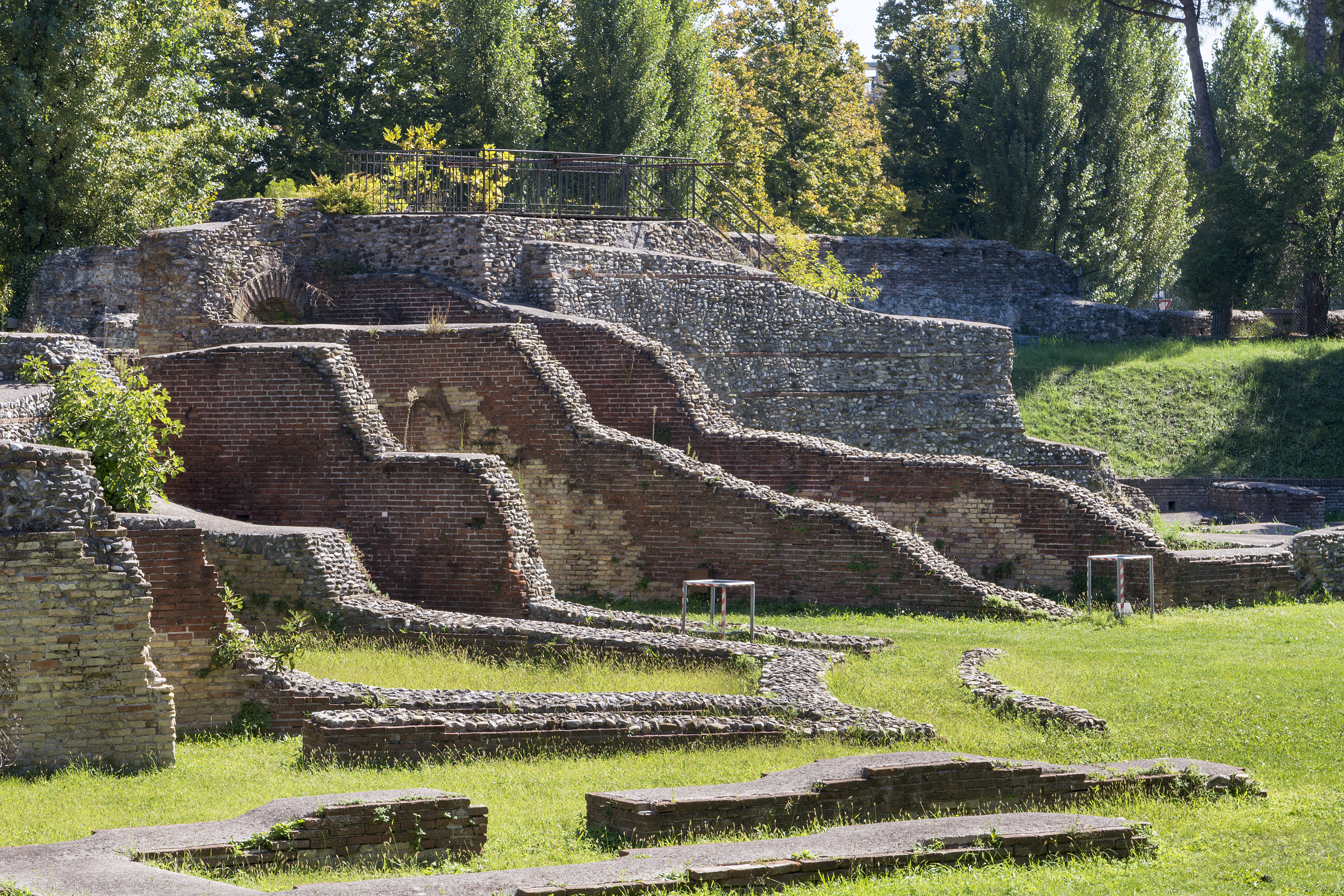 Anfiteatro romano This is a photo of a monument which is part of cultural heritage of Italy.